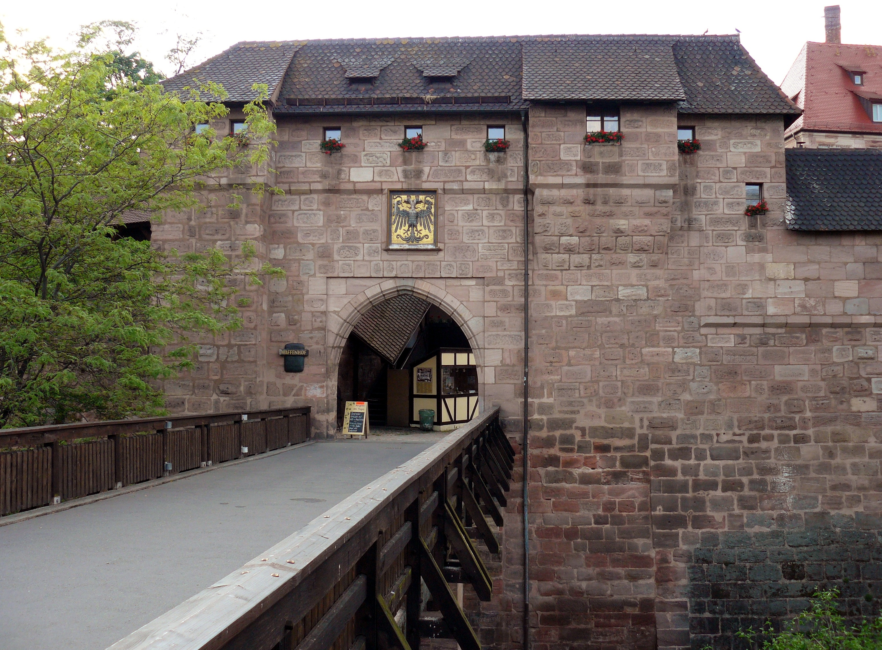 Handwerkerhof Nürnberg, Eingang Frauentor